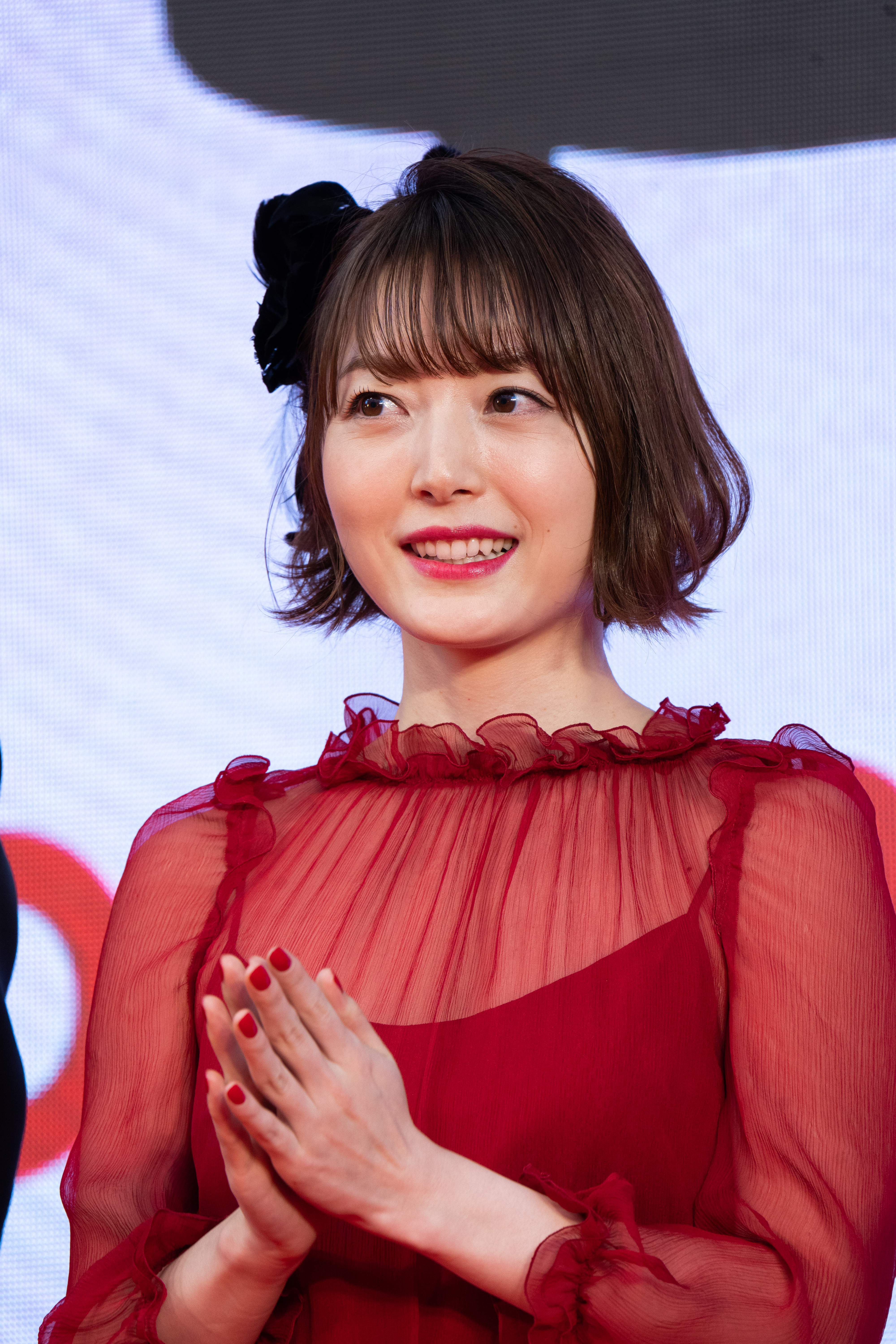 第32回 東京国際映画祭 オープニングセレモニー 花澤香菜 (HUMAN LOST 人間失格)